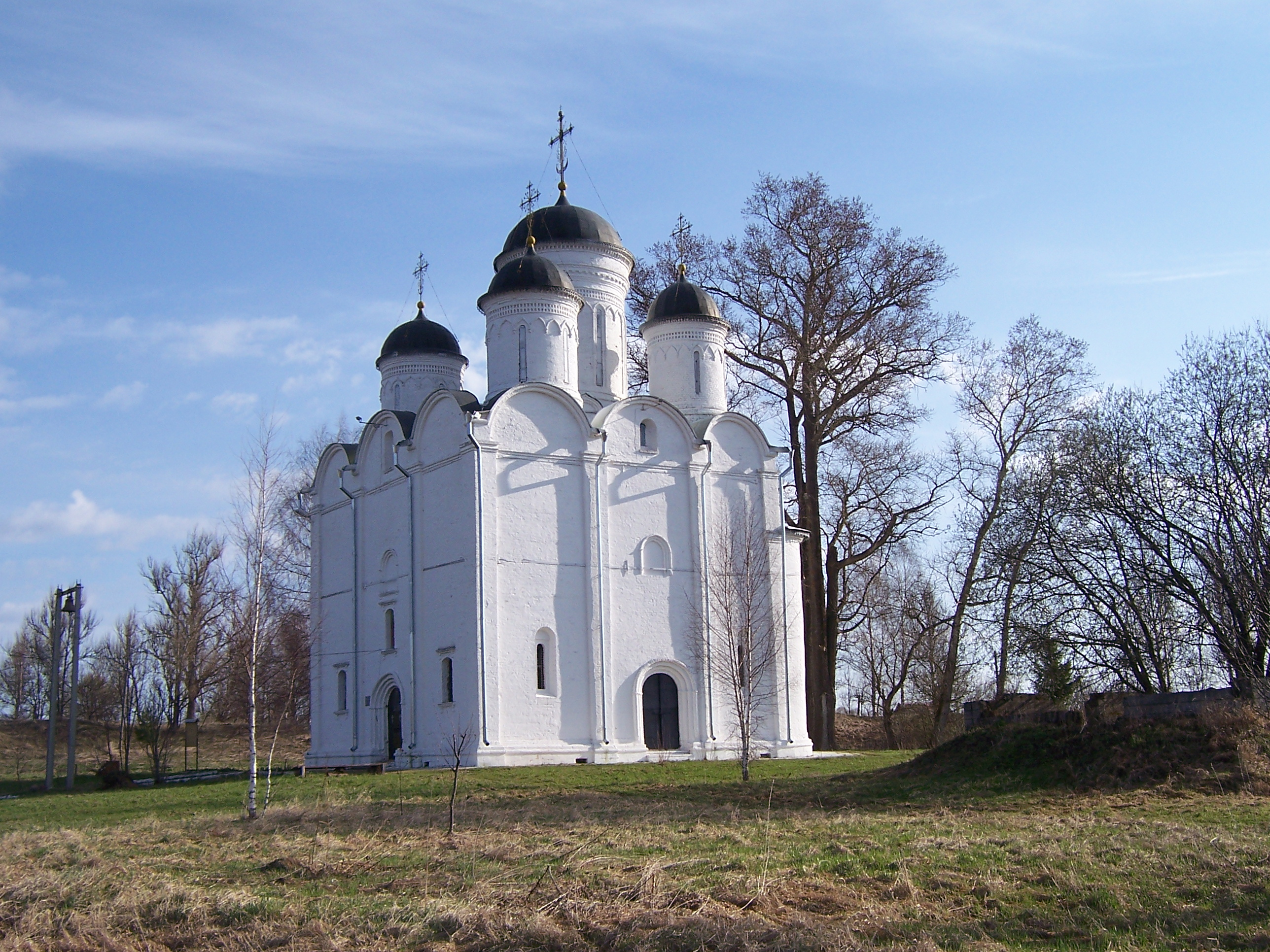 Собор Архангела Михаила XVI века в селе Микулино Лотошинского района Московской области